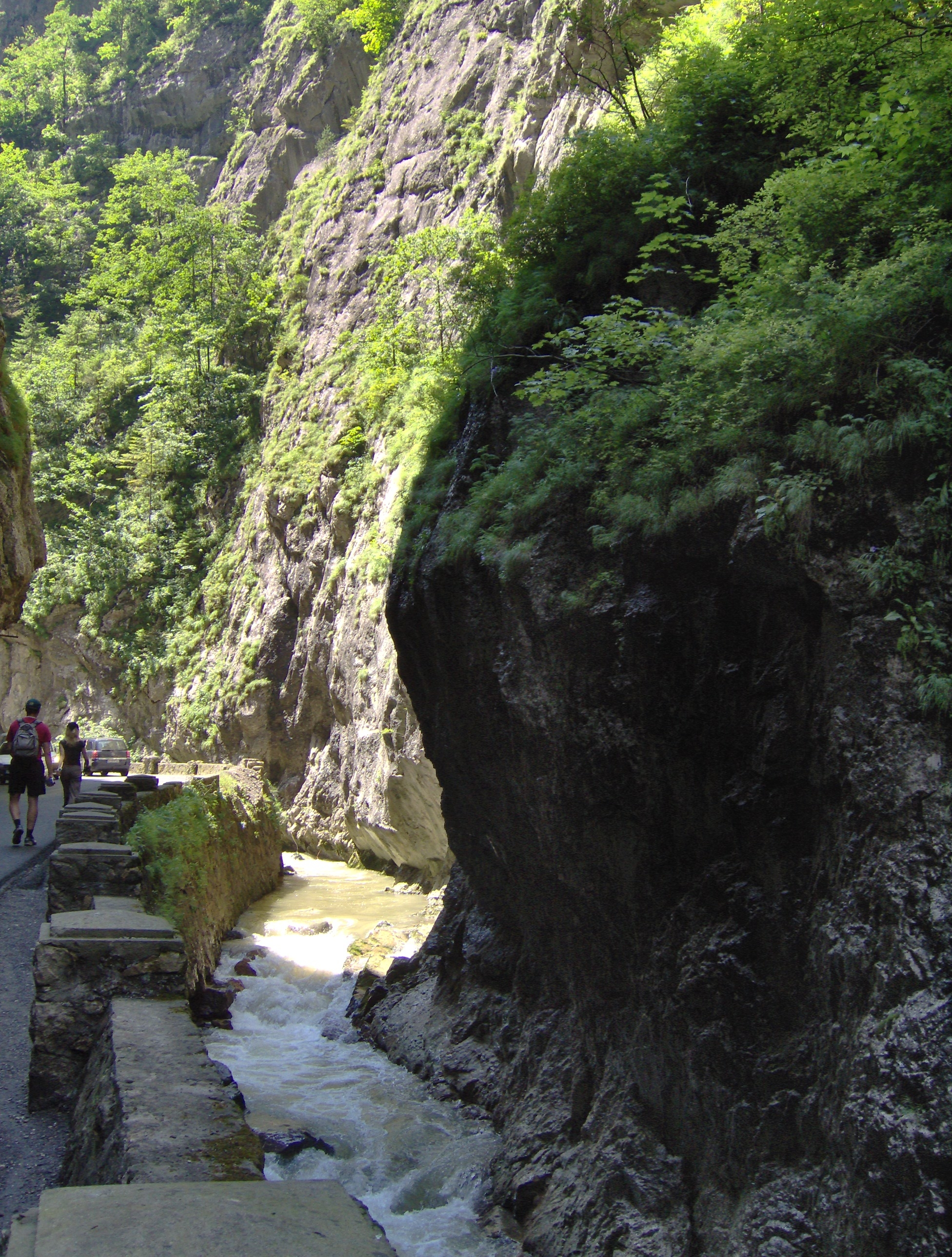 Cheile Bicazului, 2006